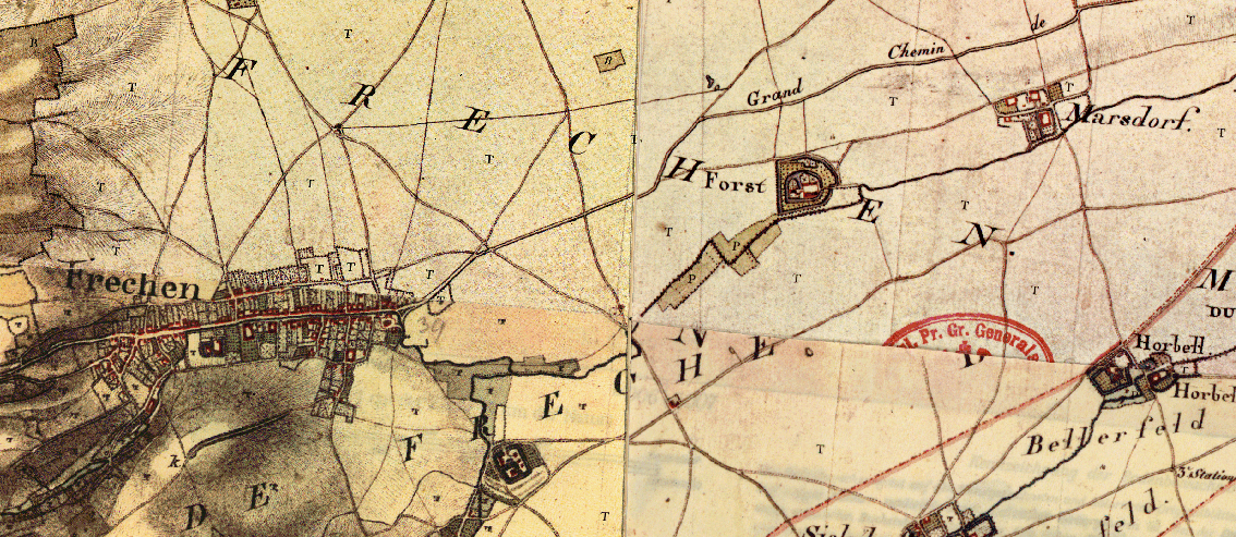 Lage des Haus Vorst/Forst bei Frechen auf der Tranchotkarte Anfang 19. Jht. Das Komposit (Ausschnitt) wurde der NRW-Datenbank tim-online2 entnommen.